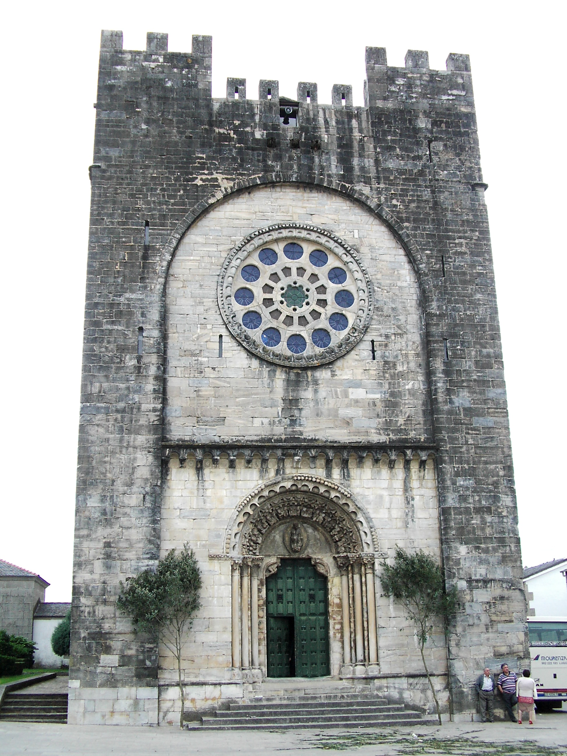 Igrexa de San Nicolás en Portomarín. Fachada principal. Tomada o 09/07/05 por user:Agremon Uploaded by User:Agremon